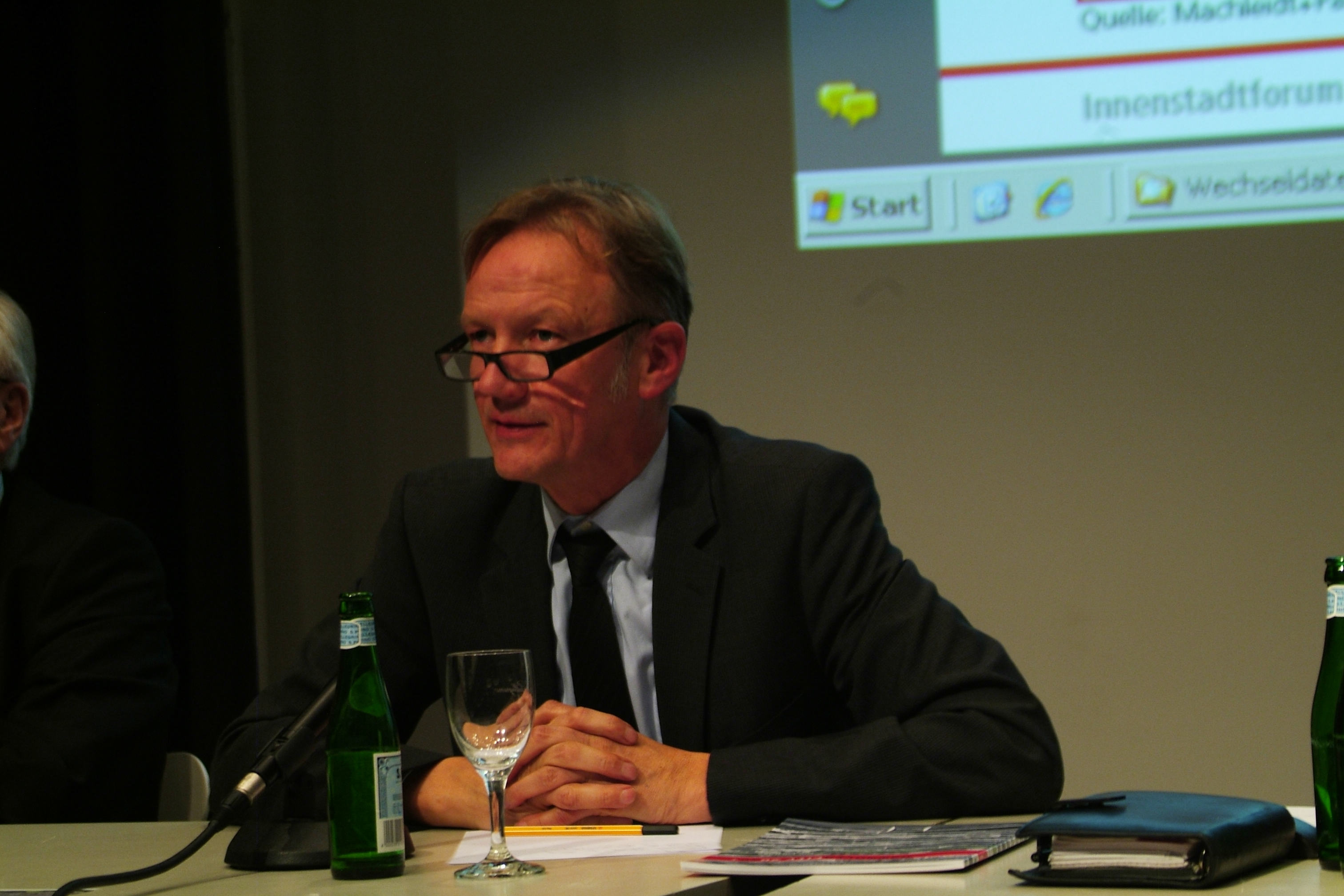 Stadtbaurat Uwe Bodemann während einer Präsentation des Entwicklungsstandes der bisherigen Ergebnisse hinsichtlich der innerstädtischen Umbauplanungen Hannover City 2020 + am 12. Dezember 2010 im Sprengel Museum Hannover. Im Podium (in der Reihenfolge der Vorträge): Stadtbaurat Uwe Bodemann, Brigitte Holz (Freischlad + Holz), Professor Michael Braum (Bundesstiftung Baukultur), Juliane Schonauer (Machleidt + Partner), Professor Rolf Wernstedt